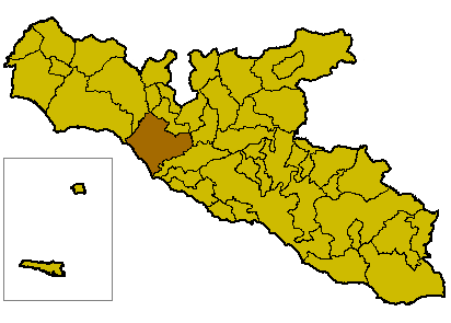 Ubicazione del territorio di Ribera nella Provincia di Agrigento.